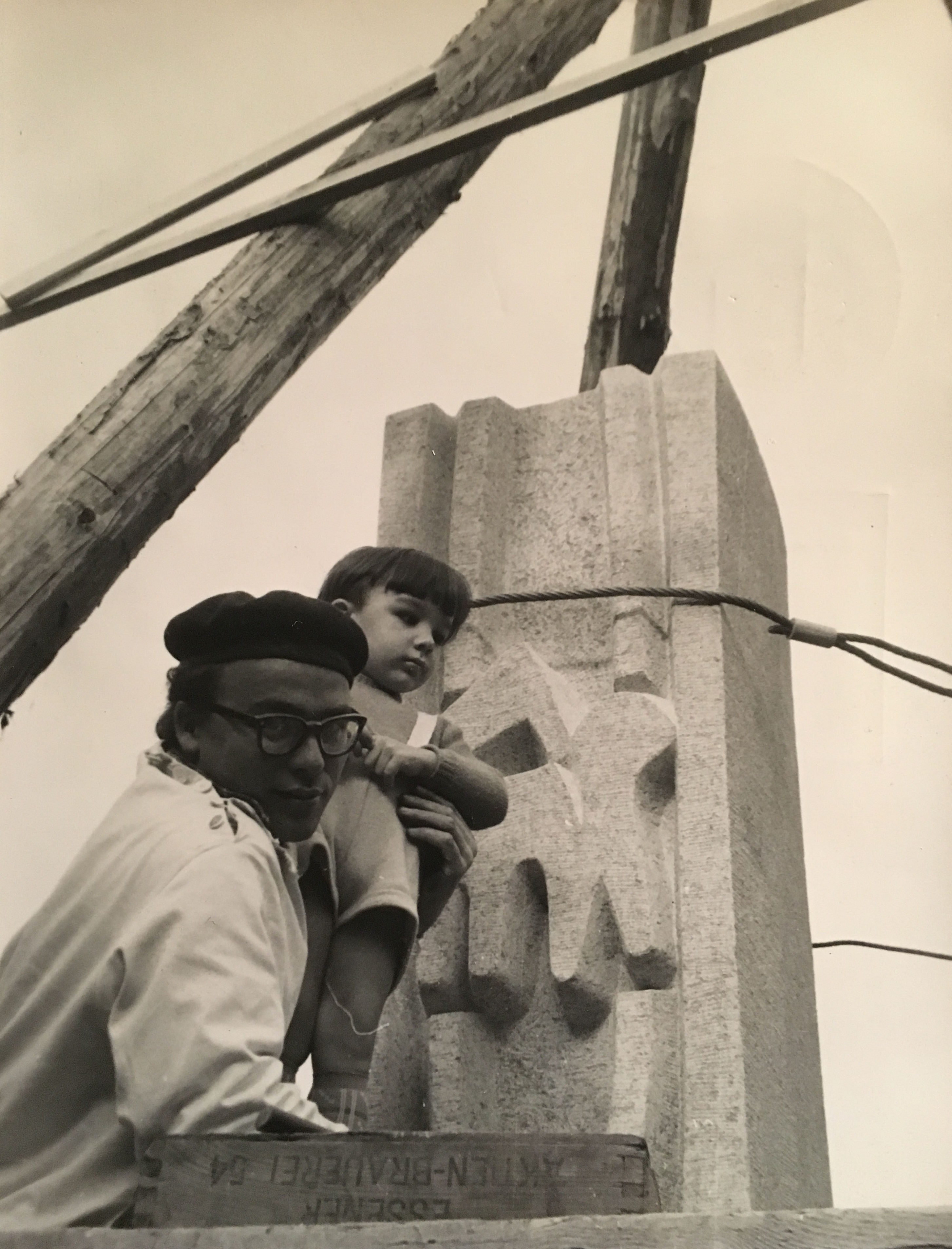 Bildhauer Rudi Scheuerman